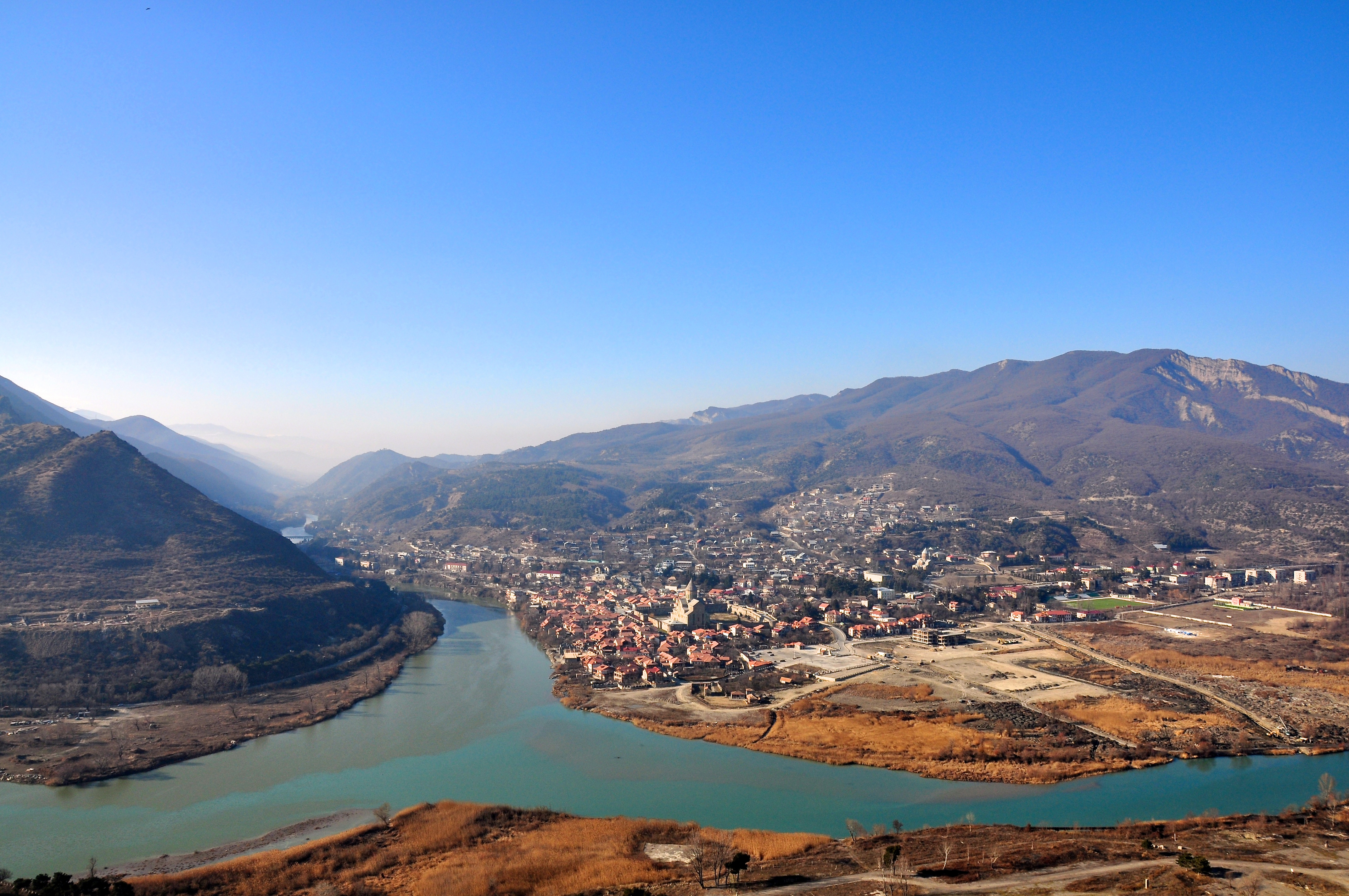 Mtskheta, une ville bien connue à environ 20 km de Tbilisi.